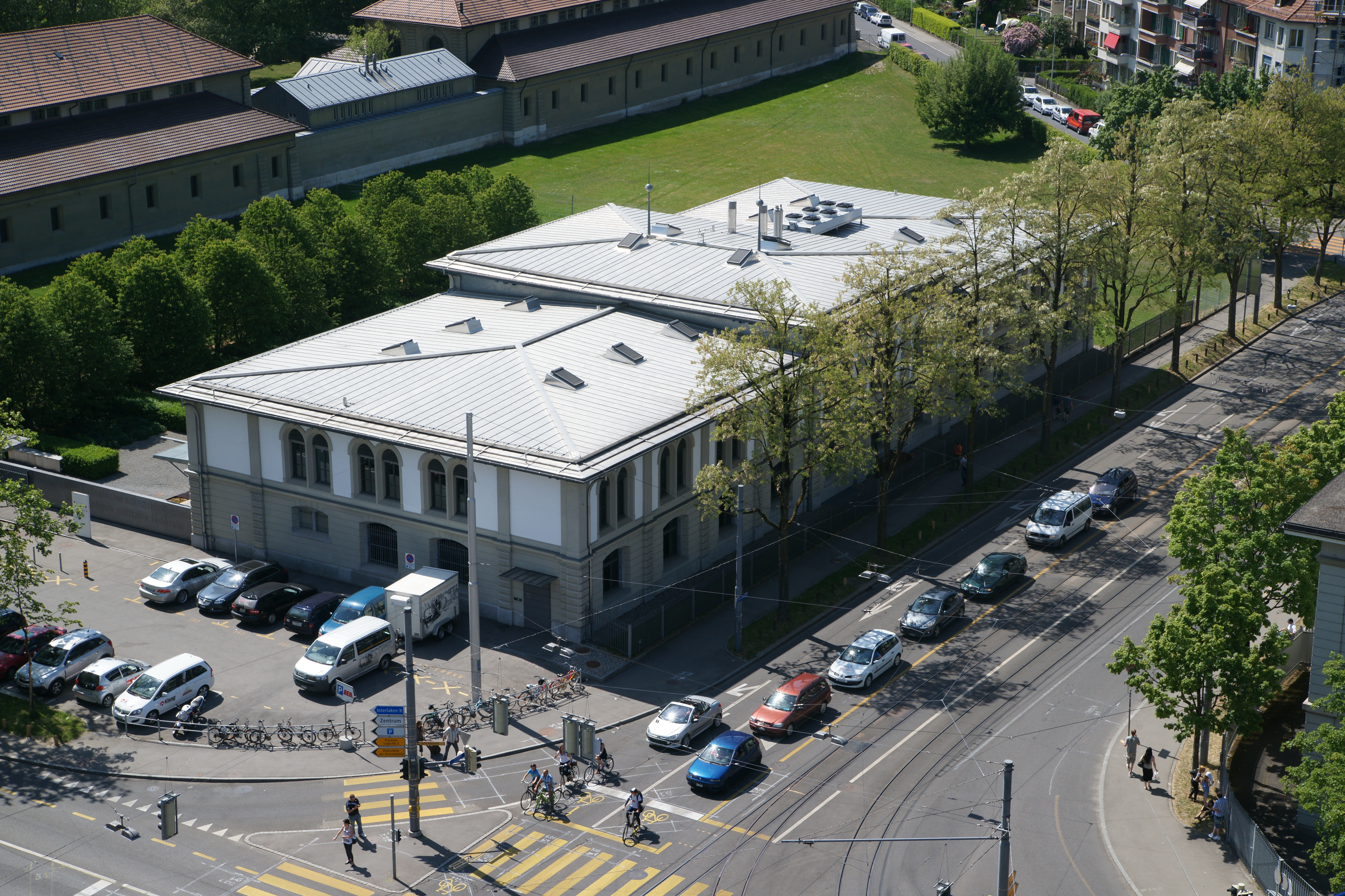 Die Bibliothek am Guisanplatz, Bern, vom Riesenrad der BEA expo aus gesehen.